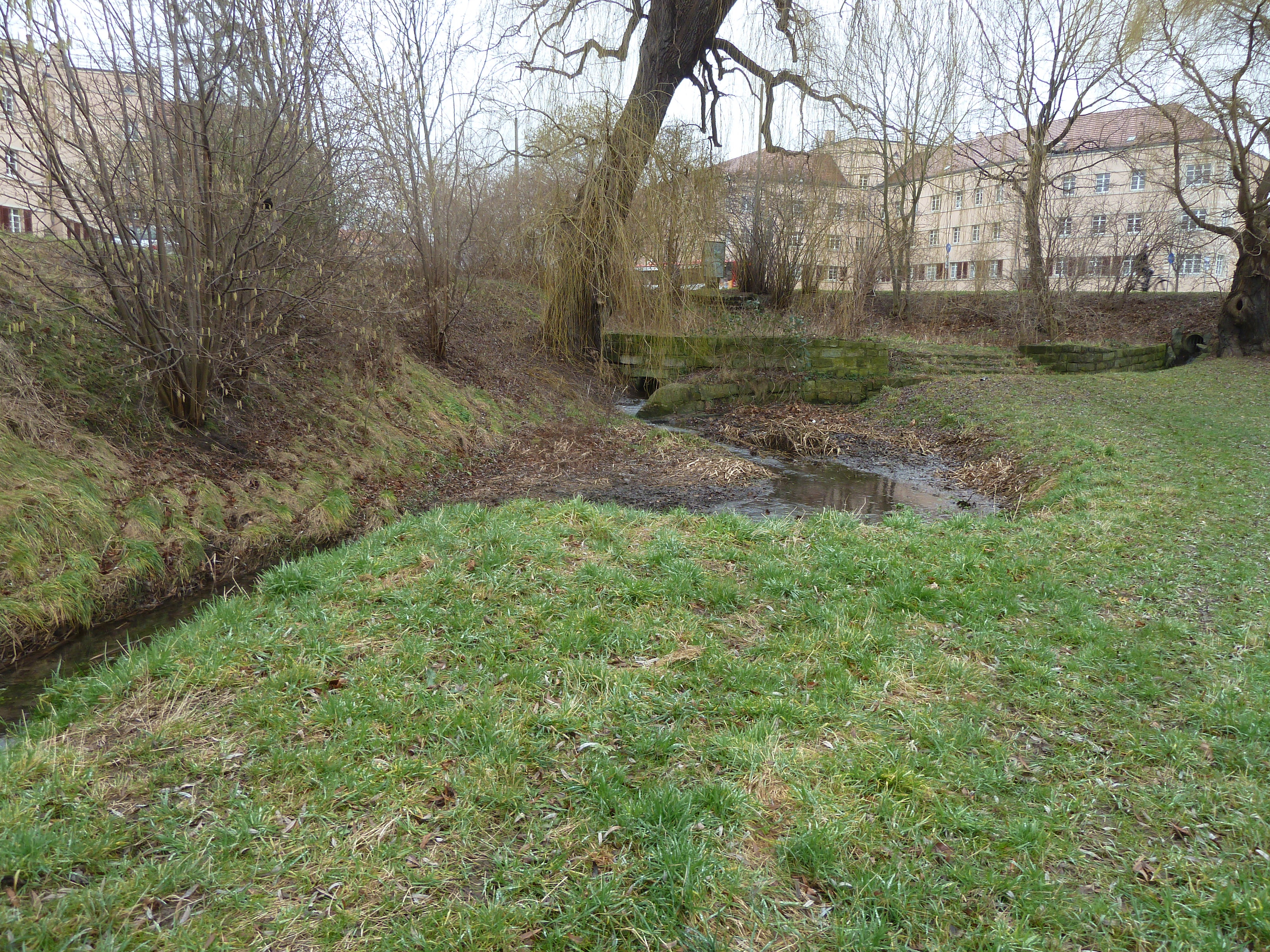 Blick auf die südöstliche Spitze des Hugo-Bürkner-Parks in Dresden mit dem Nebenarm des Leubnitzsbachs